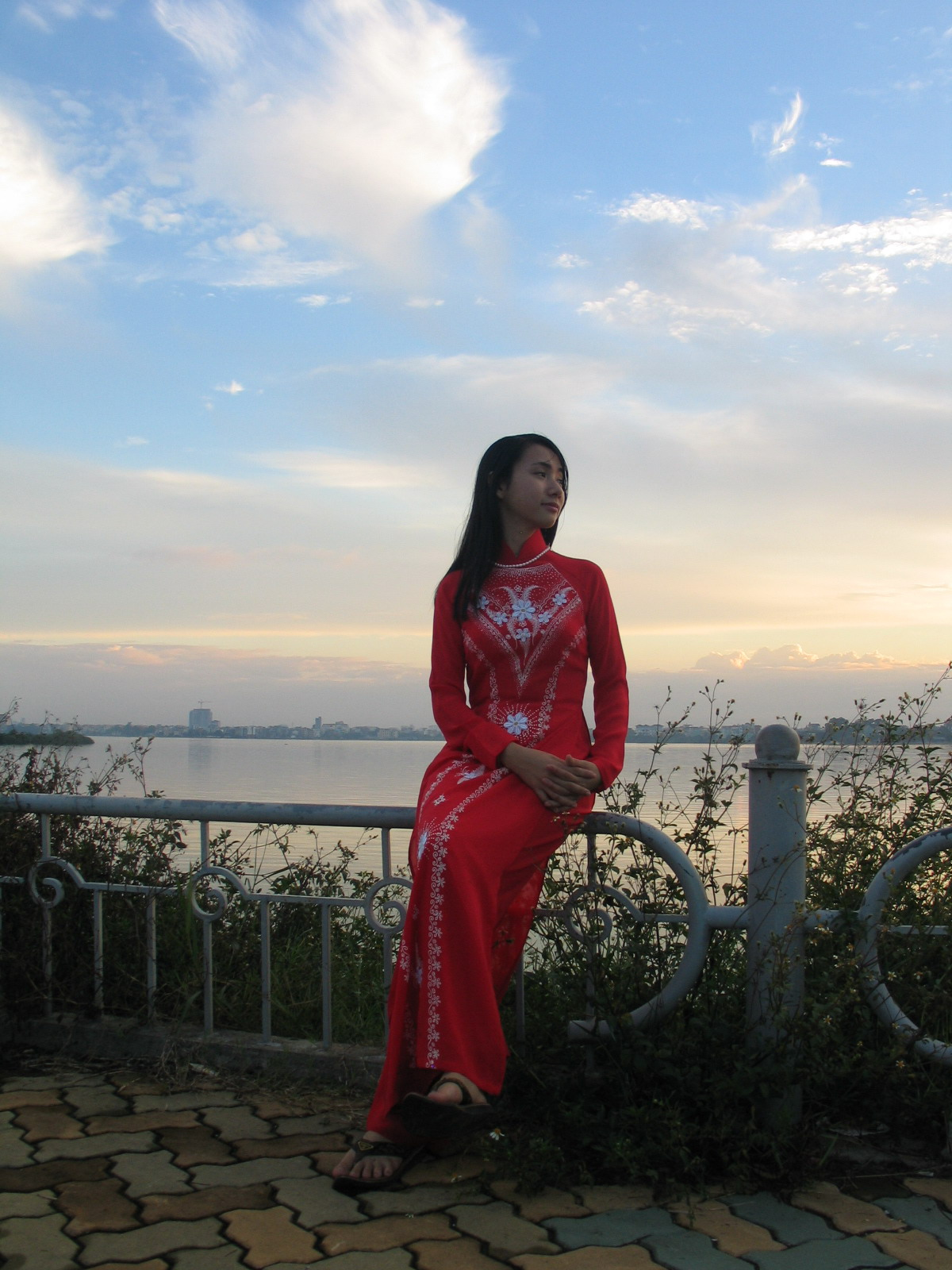 A young girl in áo dài by Hồ Tây, Tay Ho district, Hanoi city, Vietnam.